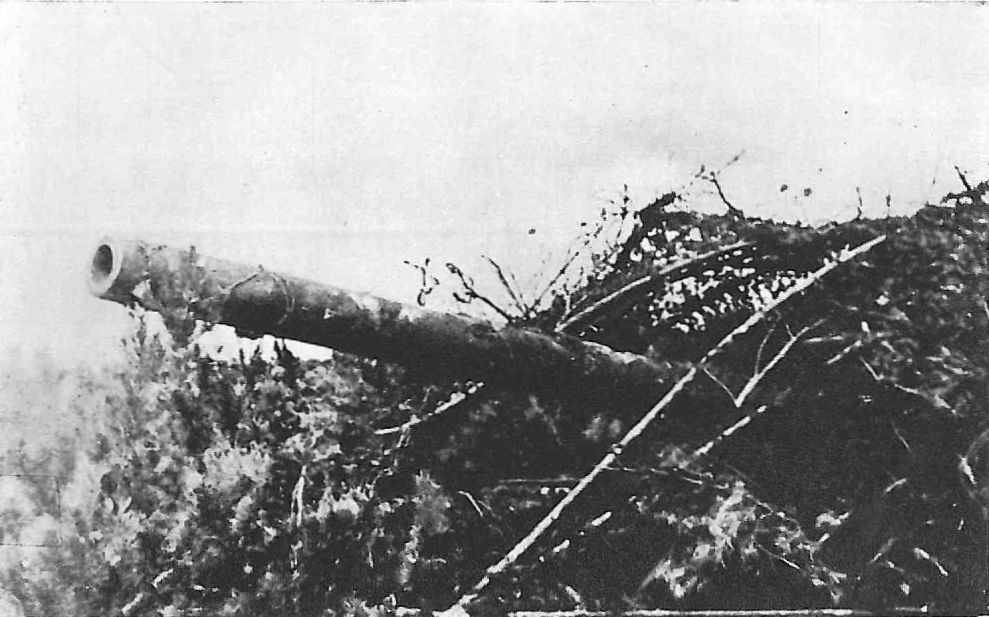 Zamaskowane stanowisko armaty Bofors kal. 152,4 mm 31. Baterii im. Heliodora Laskowskiego na Helu.